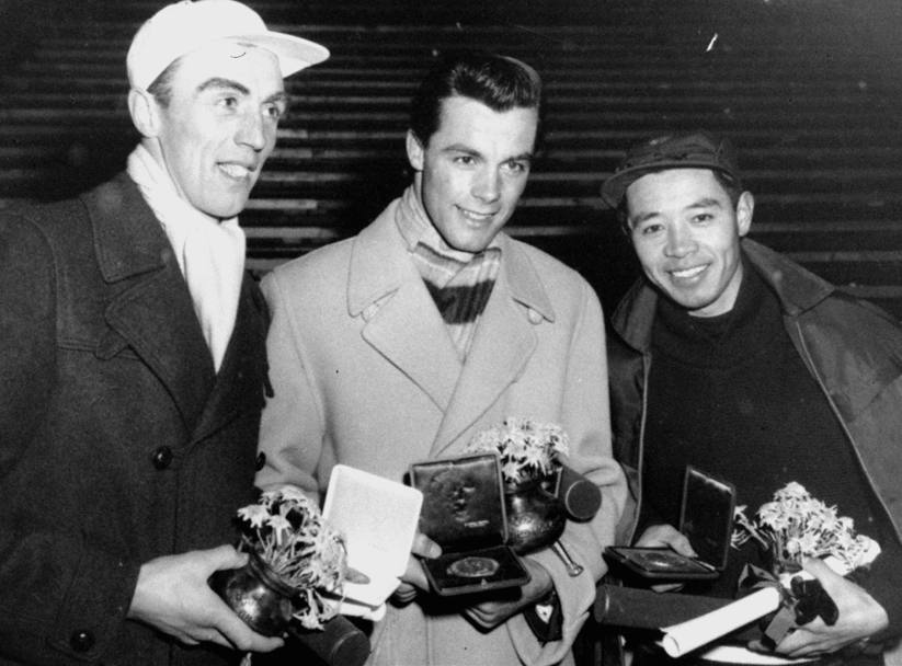 Slalom medallists at Cortina 1956 (Stig Sollander - Toni Sailer - Chiharu Igaya)